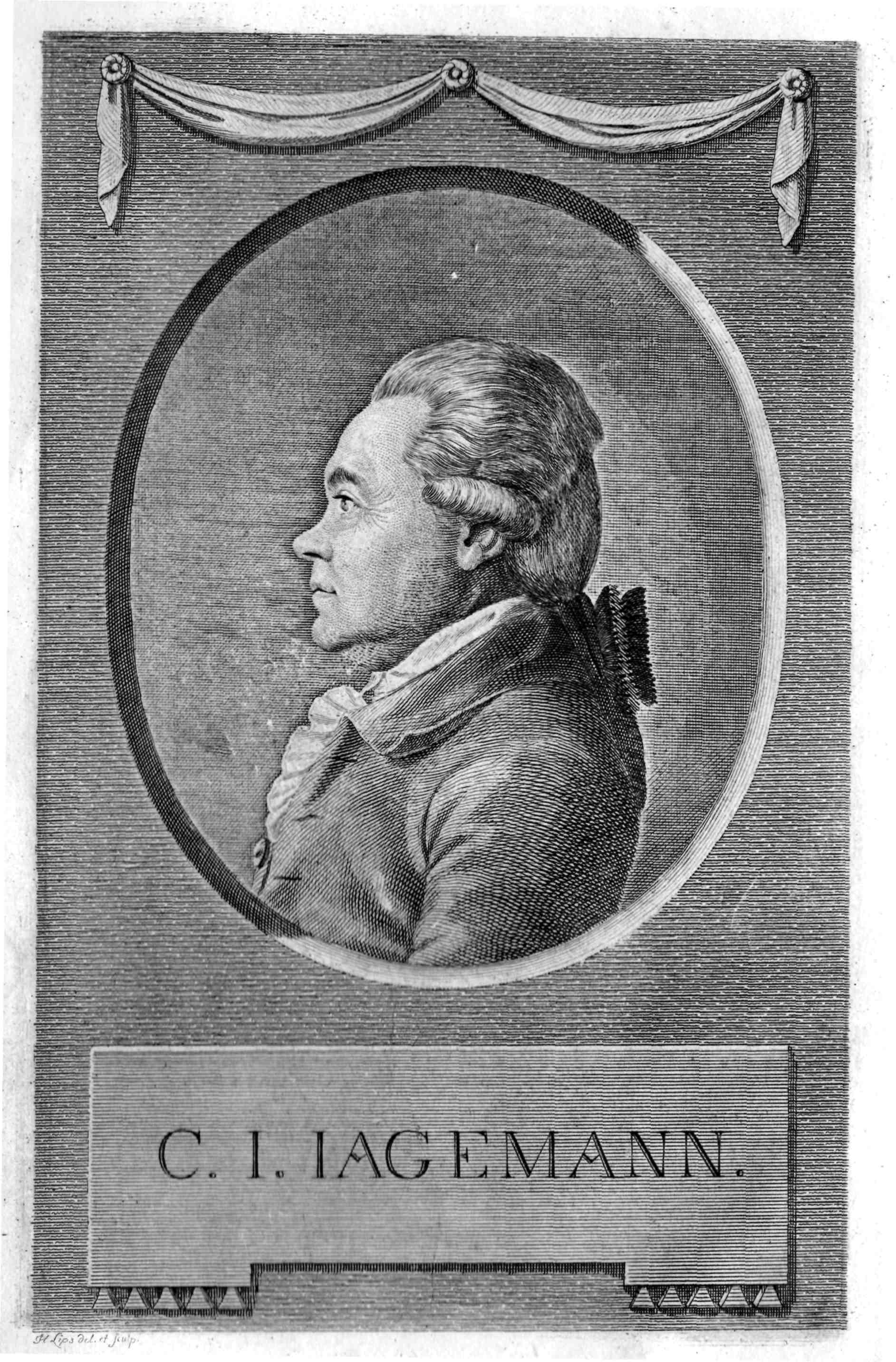 Ritratto dell'italianista, consigliere e bibliotecario alla corte di Weimar, Christian Joseph Jagemann (1735-1804). Incisione su rame (acquaforte) di Johann Heinrich Lips (1758-1817), 1803. Pubblicato sul frontespizio della seconda ed. del Dizionario Italiano-Tedesco e Tedesco-Italiano (Lipsia, 1803). Dimensioni: 174x107 mm. Firmato: «H. Lips del[ineavit]. et sc[ulpsit].».